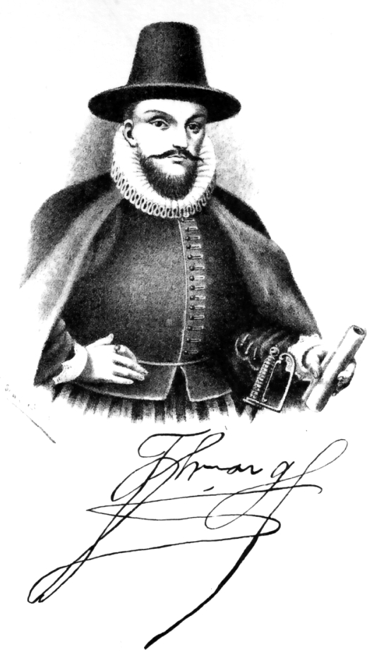 García Hurtado de Mendoza y Manrique "Marqués de Cañete" (1535 - 1609) Gobernador de Chile (1557-1561) y Virrey del Perú (1589-1596).